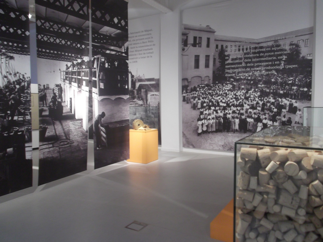 Vistes interiors del Museu del Suro de Palafrugell